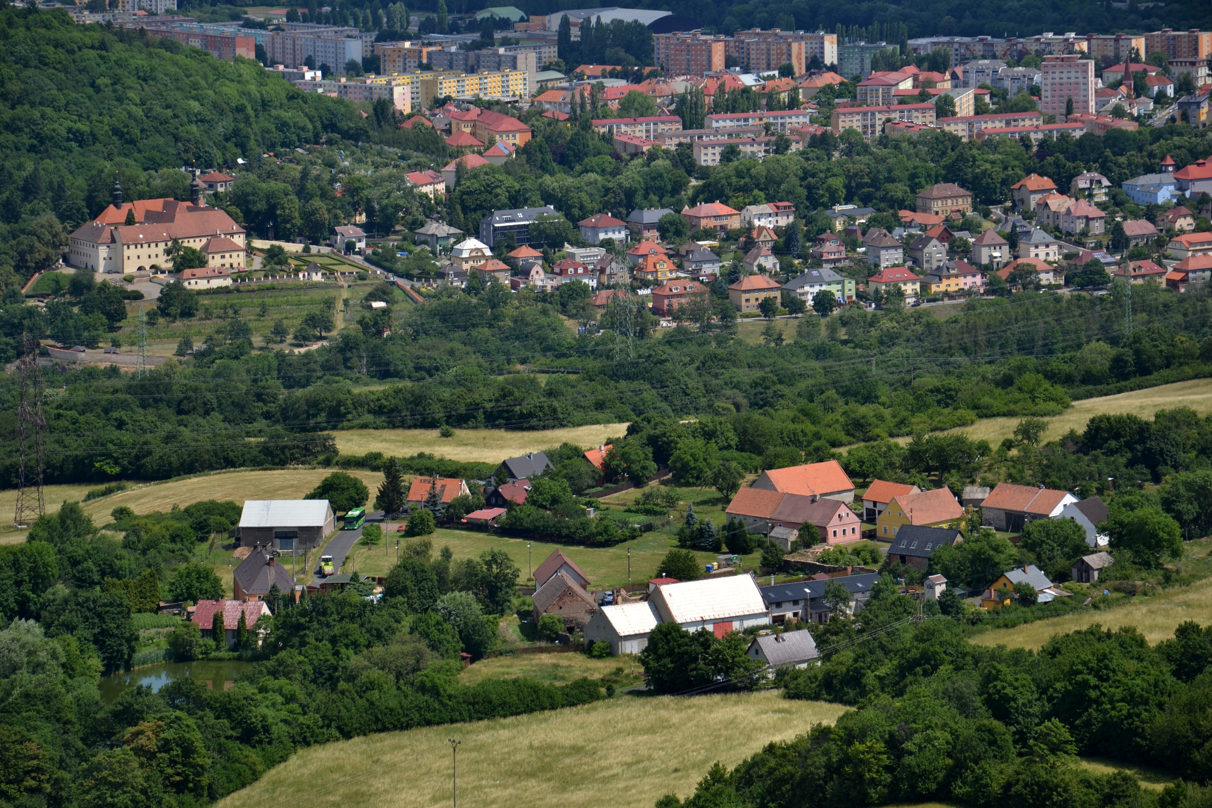 Pokutice – pohled z Úhoště; v pozadí Kadaň s františkánským klášterem